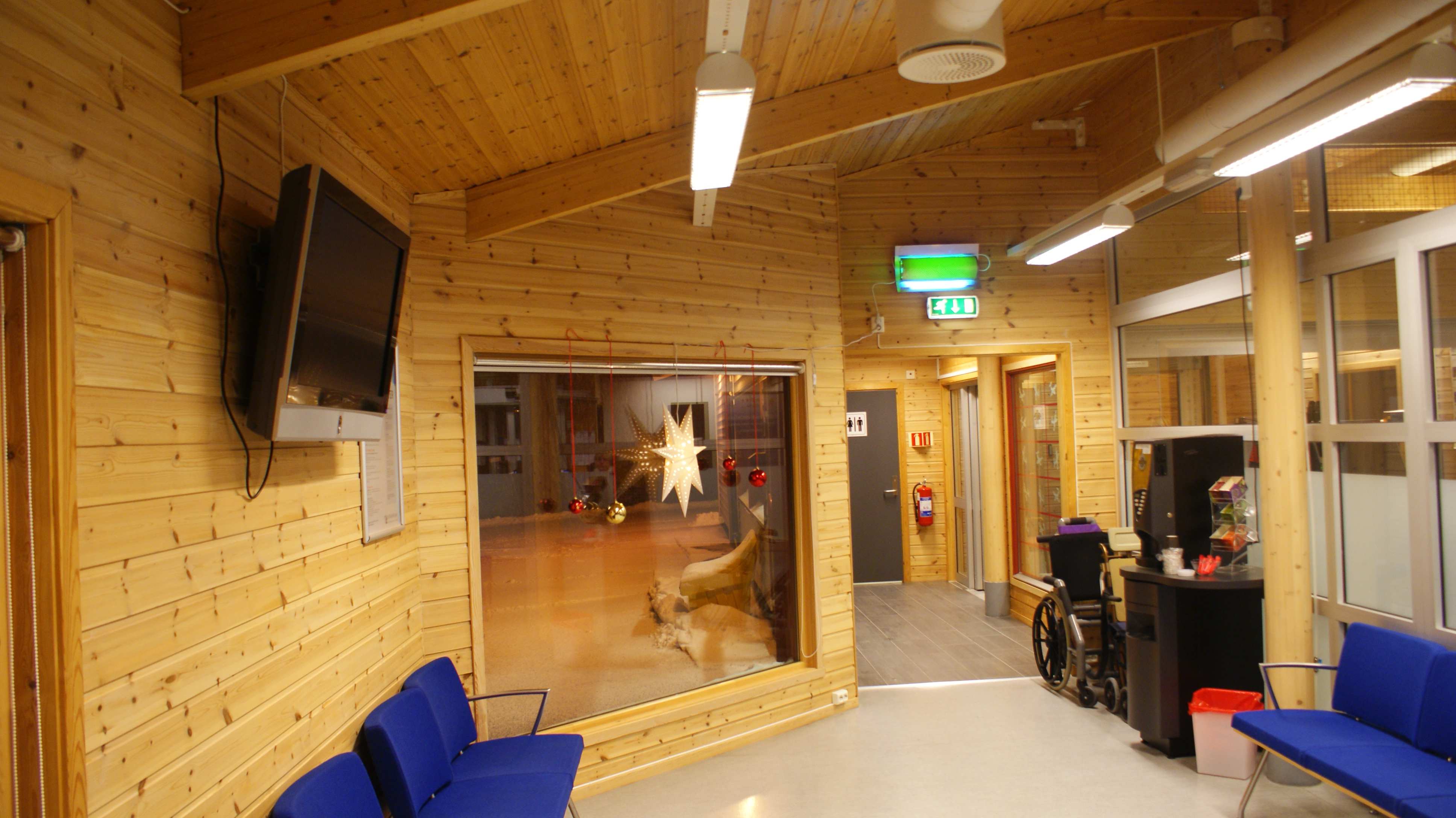 Mehamn Airport, Nordkinnhalvøya, Finnmark, Norway. Terminal interior.